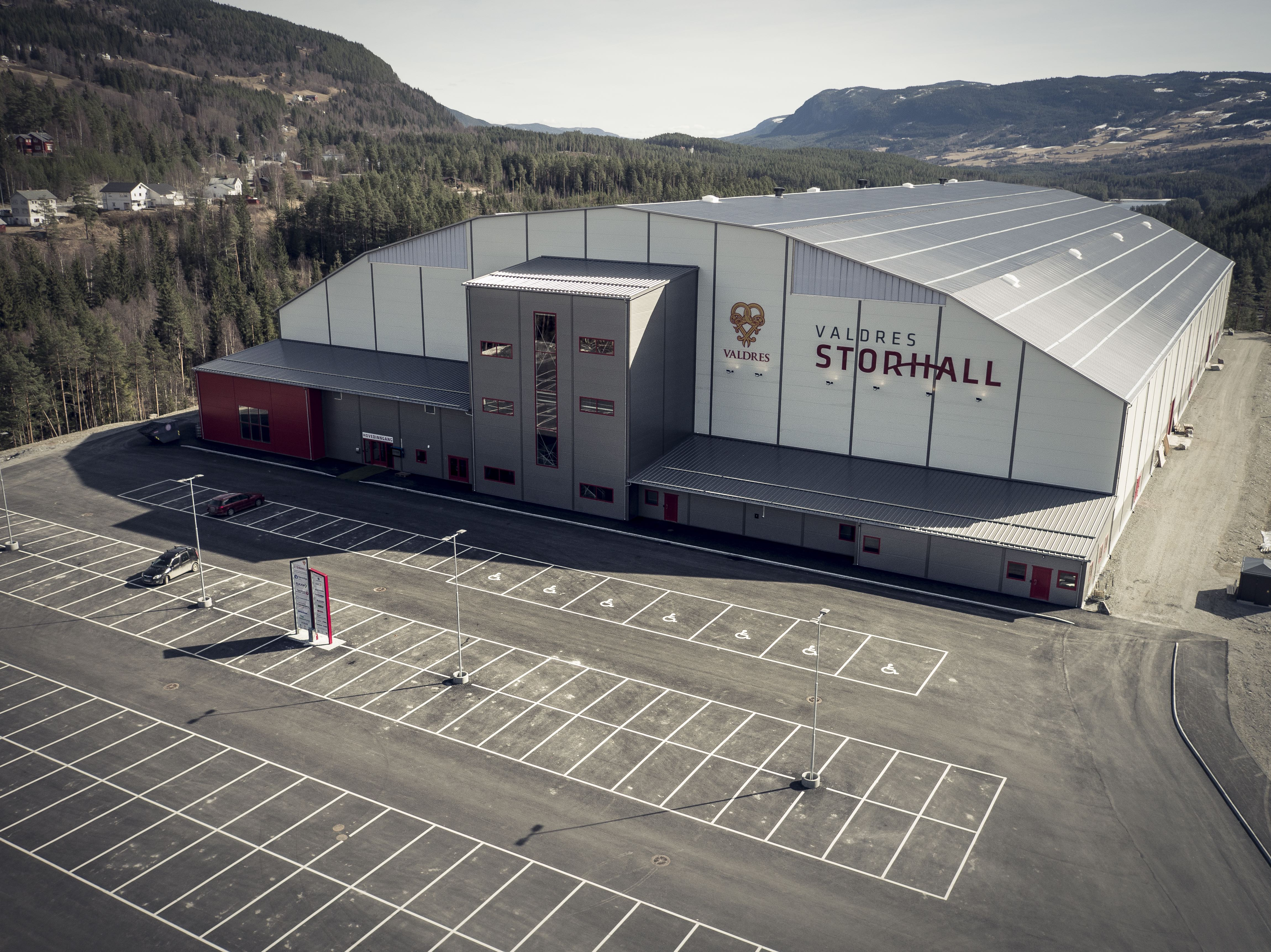 Bilde av Valdres Storhall, våren 2017